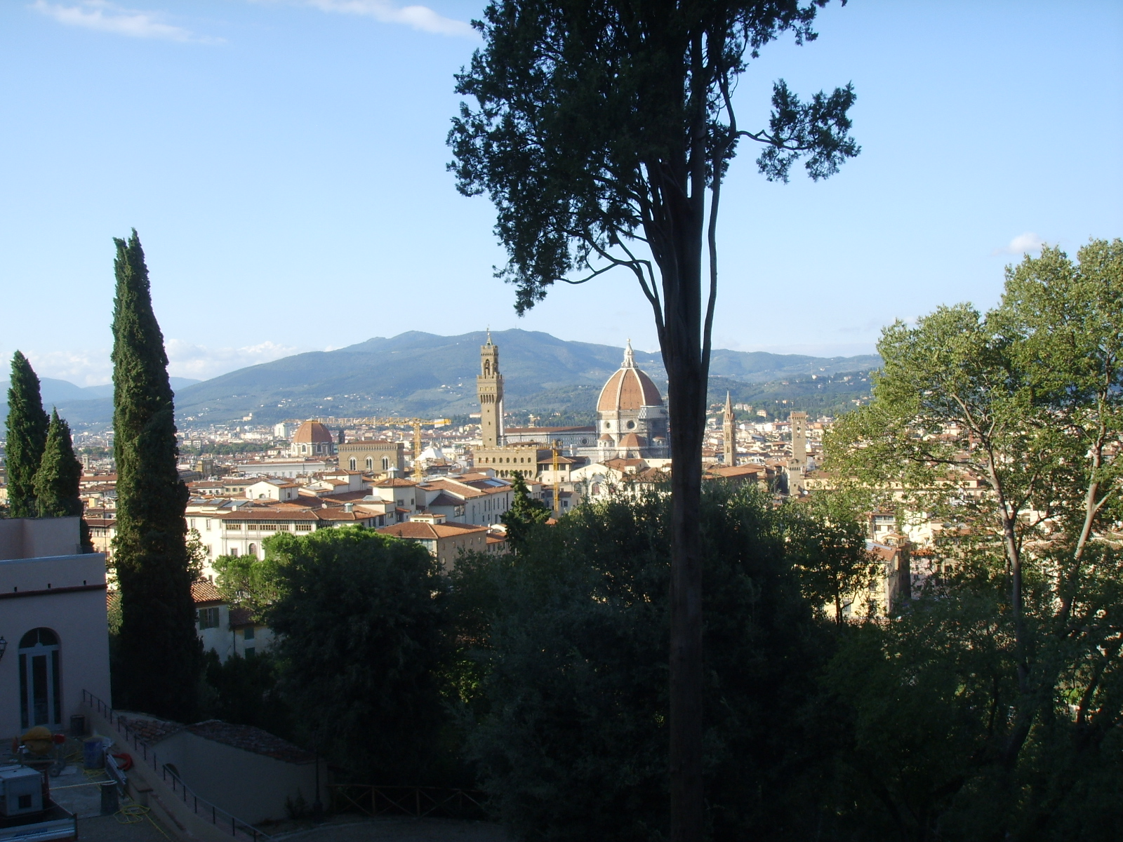 Villa bardini panorama di firenze